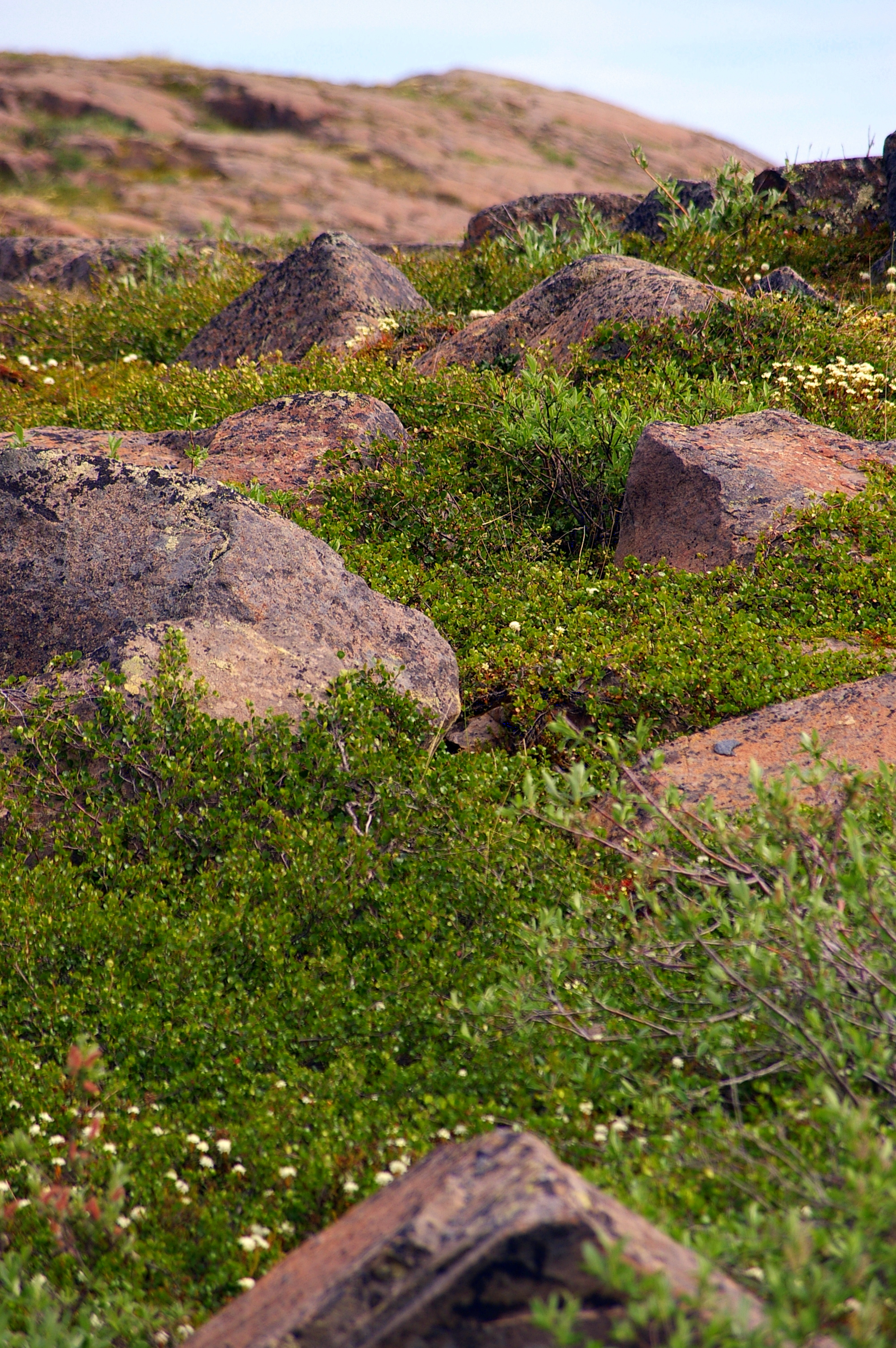 Wildflowers, Kugluktuk, Nunavut (2008).